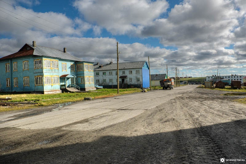 Амдерма, Центральная улица.